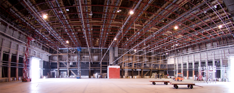 Leeres Studio 4/5 der Bavaria Studios am Standort Geiselgasteig.